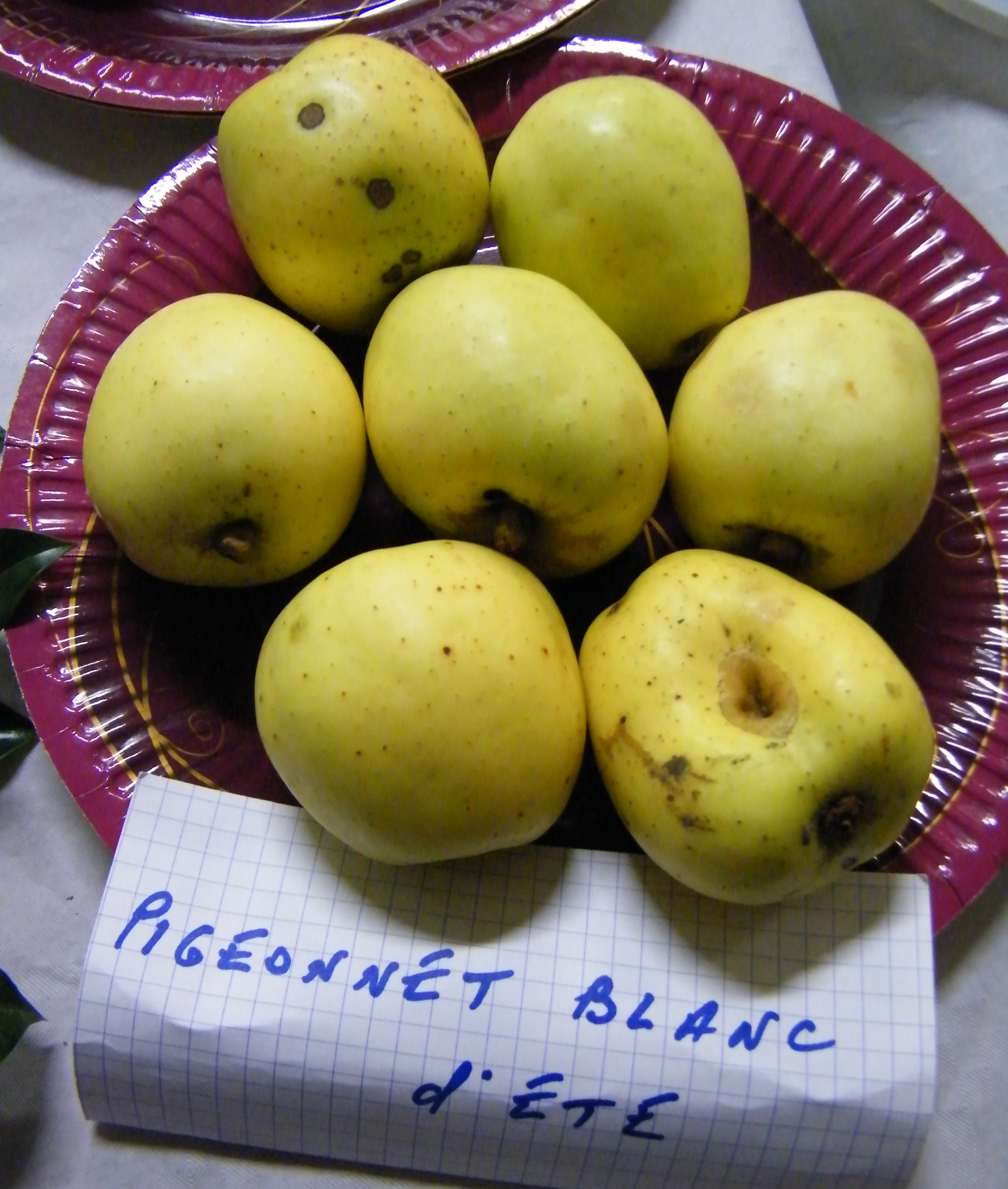 Pigeonnet Blanc d'Eté, Mons-Boubert, Somme, Fr